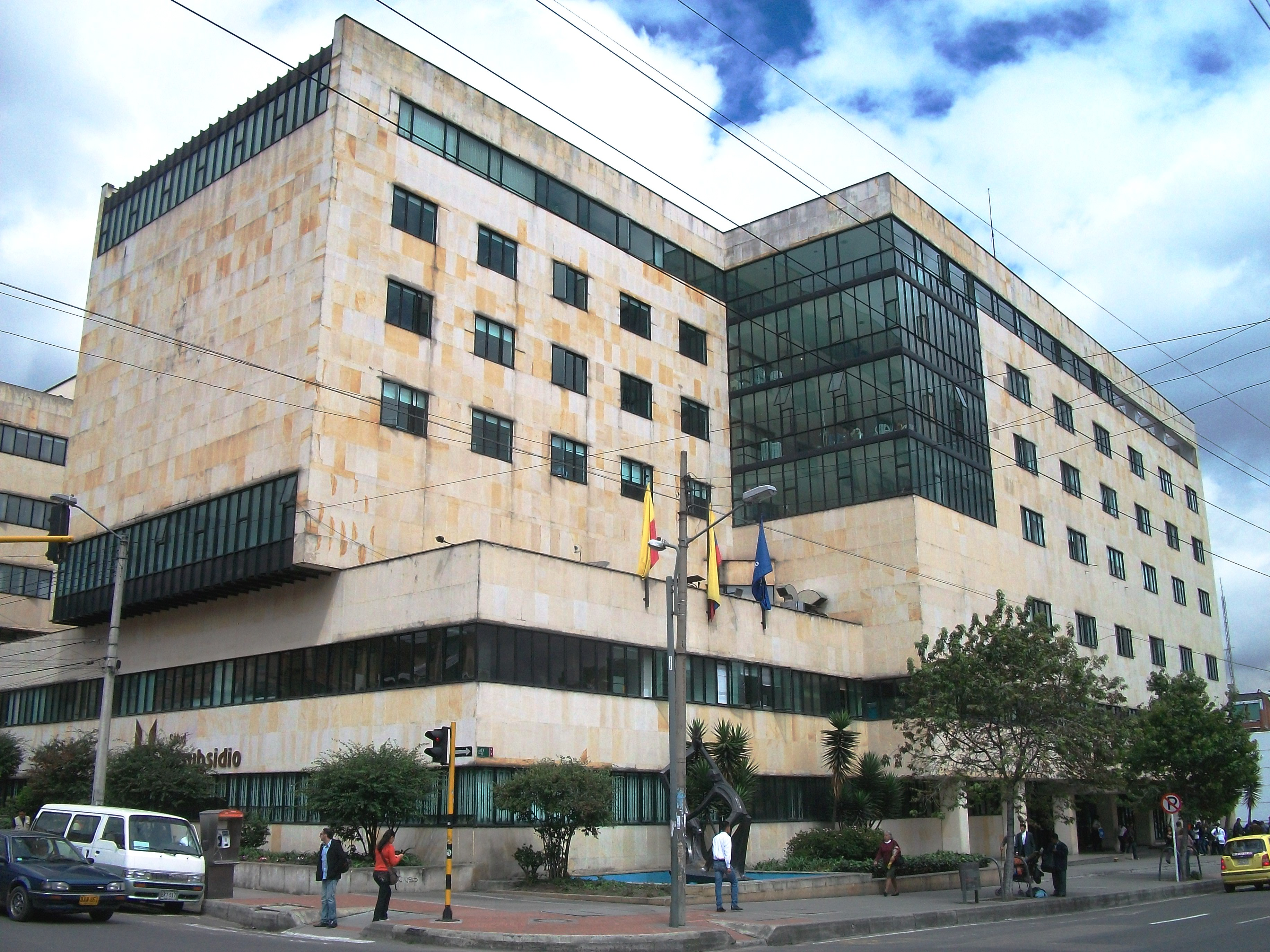 Clínica Colsubsidio en Bogotá, calle 67 entre las carreras 10 y 11. Barrio Chapinero Norte de la Localidad de Chapinero.